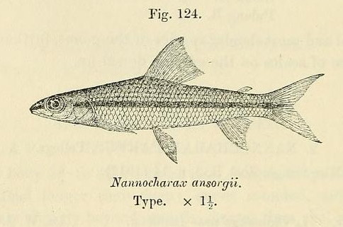 Nannocharax parvus